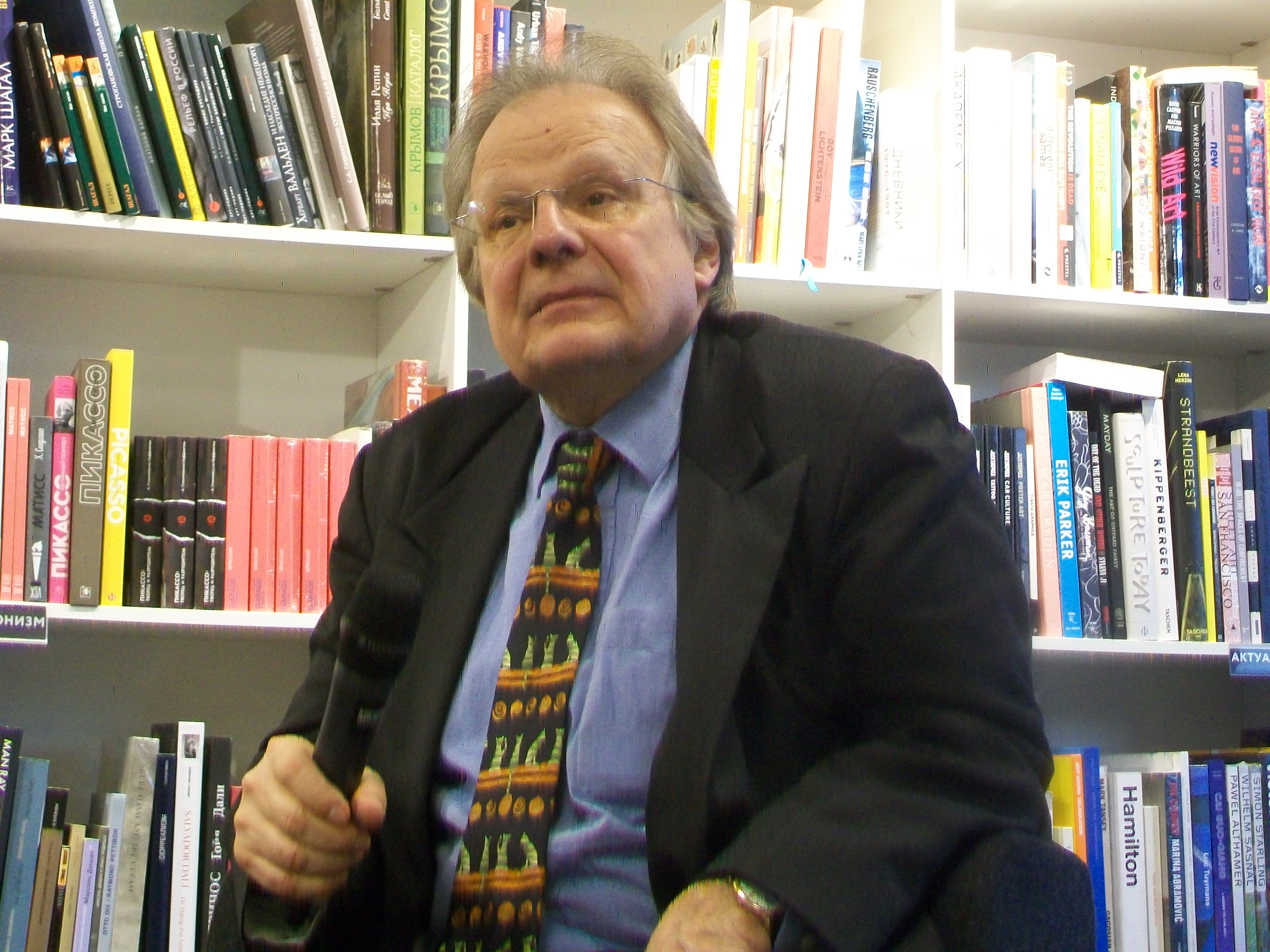 Дмитрий Борисович де Кошко в Екатеринбурге, Ельцин-центр, книжный магазин Пиотровский, 29 марта 2018 года